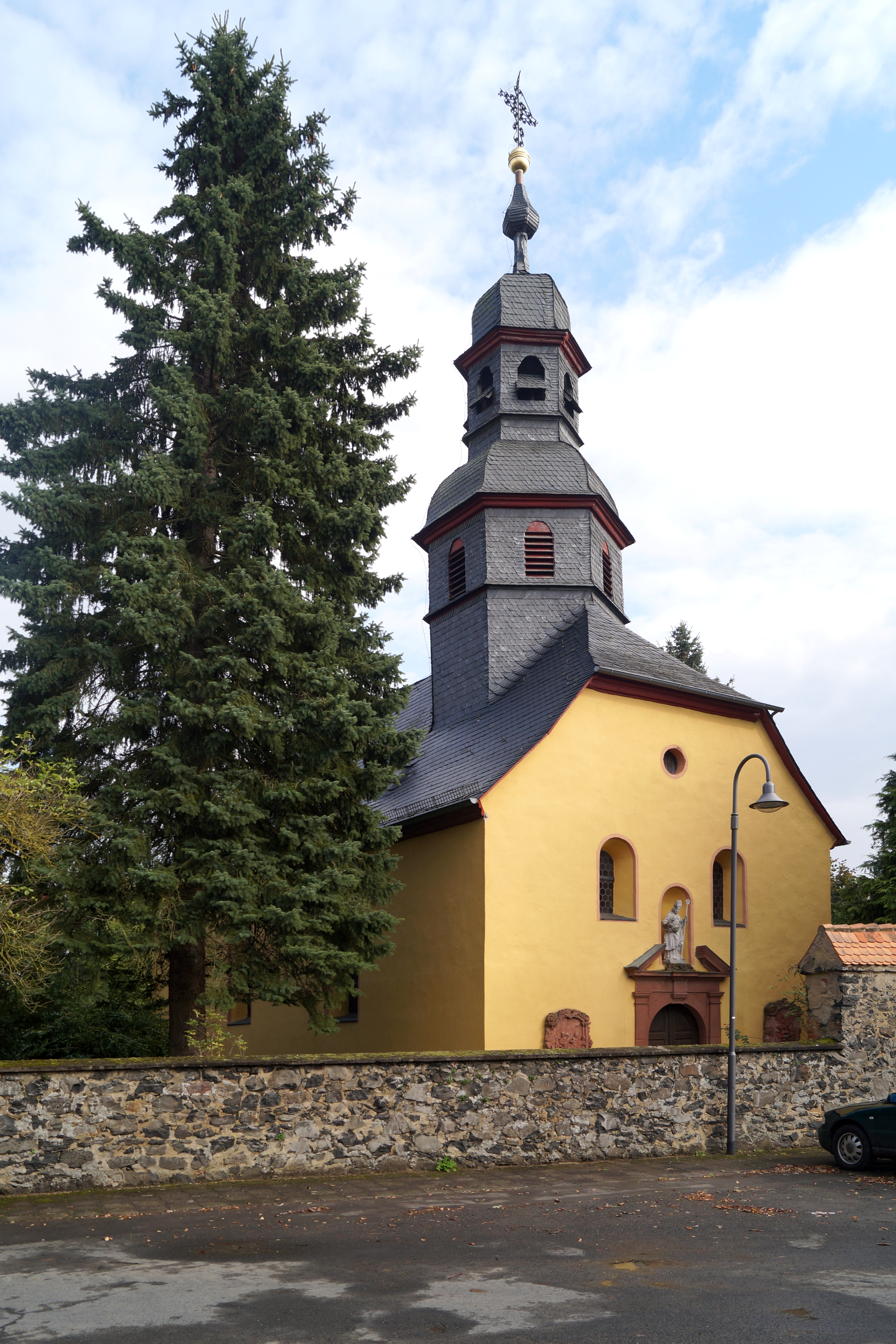 Ansicht der Westfront der 1707 erbauten katholischen Pfarrkirche St. Nikolaus in Wickstadt, Stadt Niddatal im Wetteraukreis in Hessen.